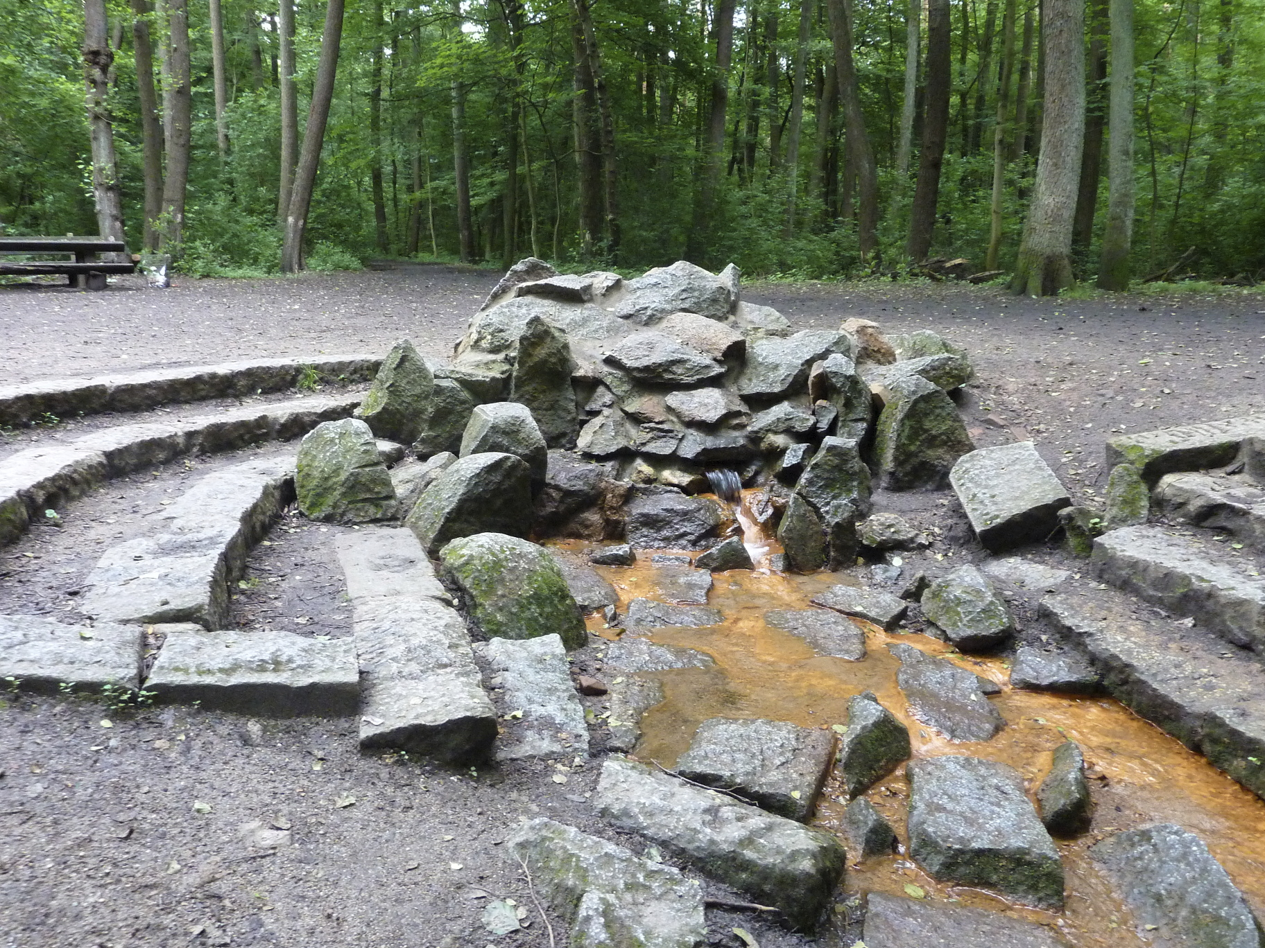 Frankfurt am Main, Stadtwald im Stadtteil Sachsenhausen: Das Königsbrünnchen ist eine in Stein gefasste Quelle nordwestlich des Jacobiweihers, im Cleeisches Wäldchen genannten Auwald-Teil des Oberwaldes. Das Wasser der Quelle fließt bereits nach wenigen Metern dem Königsbach (auch Luderbach genannt) zu, einem linken Zufluss des Mains. Das Wasser ist in Frankfurt bekannt für seinen Eisenhydroxid- und Schwefelwasserstoff-Gehalt. Das Foto zeigt die Quellfassung nach der Renovierung im Jahr 2012